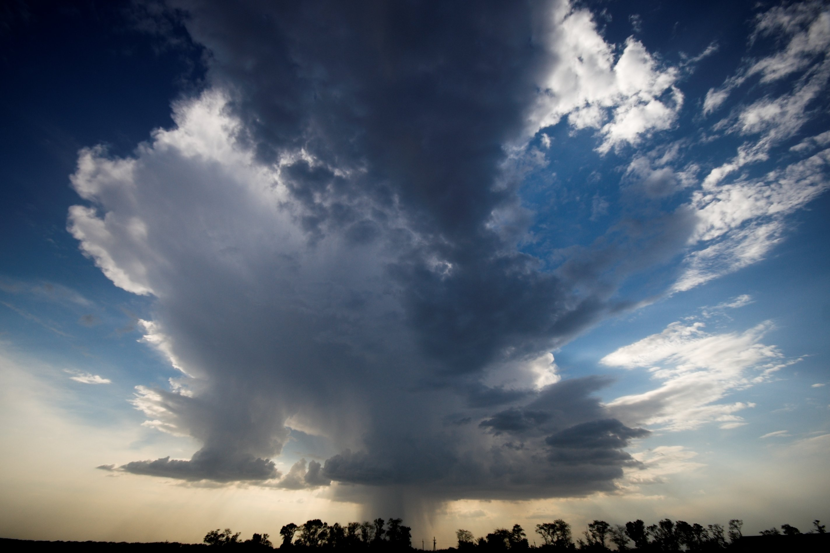 Sigma 10-20 Sky shot